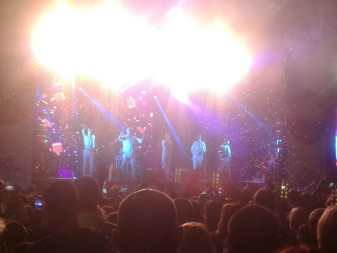 В Мелитополе